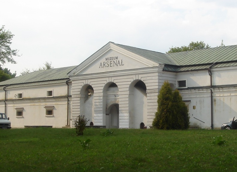 Arsenal / Arsenał